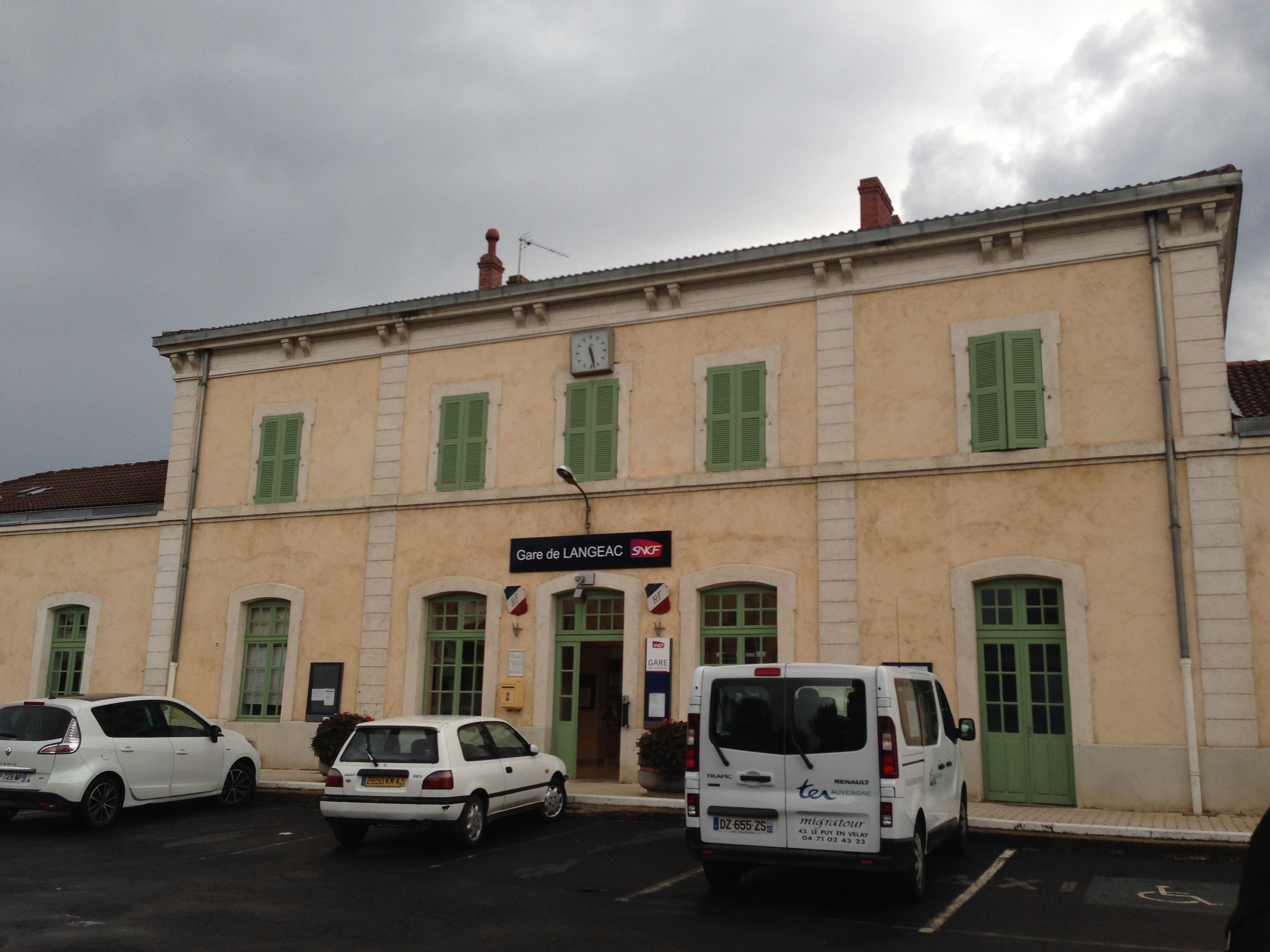 Gare de Langeac en 2017